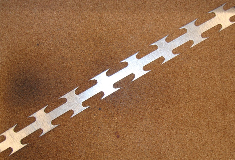 Колючий дріт "Єгоза".